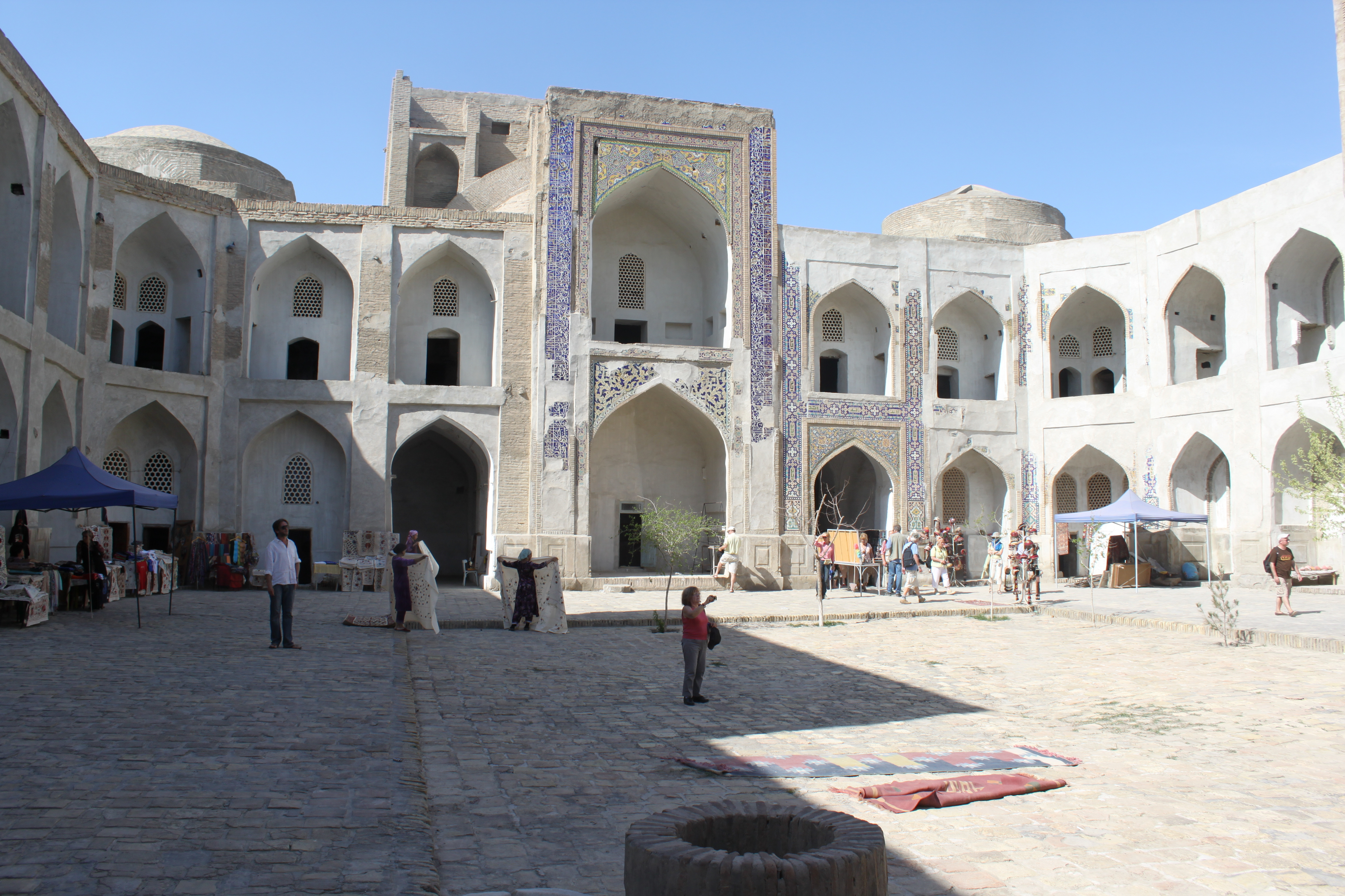 Cour intérieure de la madrasa Abdullaziz Khan